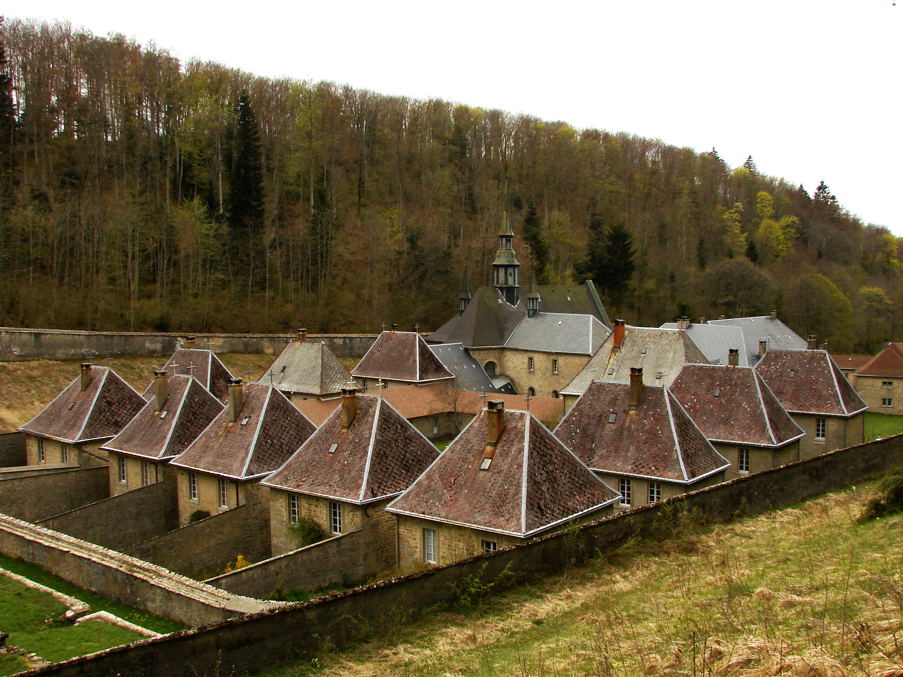 Vue des bâtiments de la chartreuse de Portes